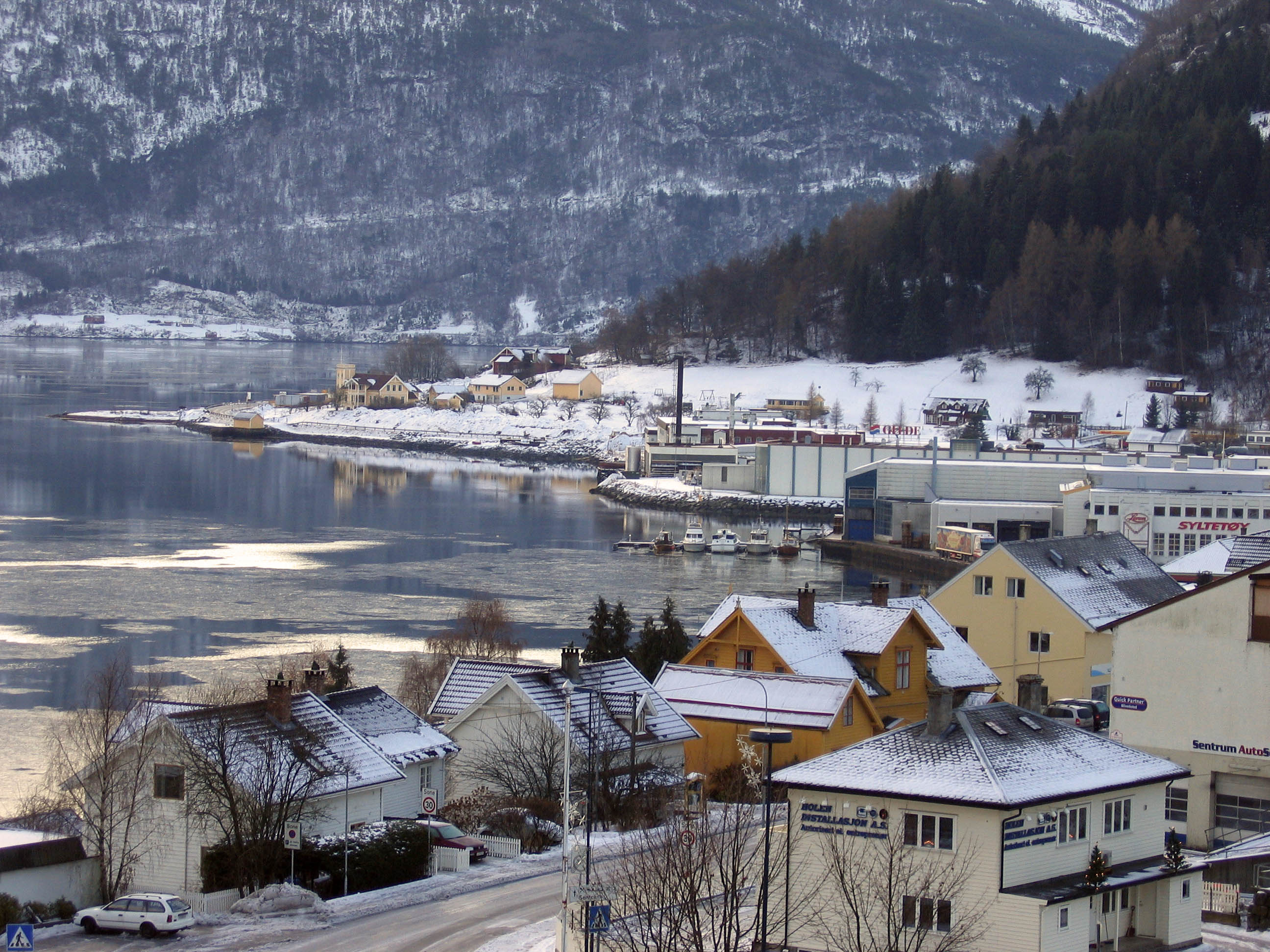 Sogndal, Sogndal, Sogn og Fjordane, Norway.